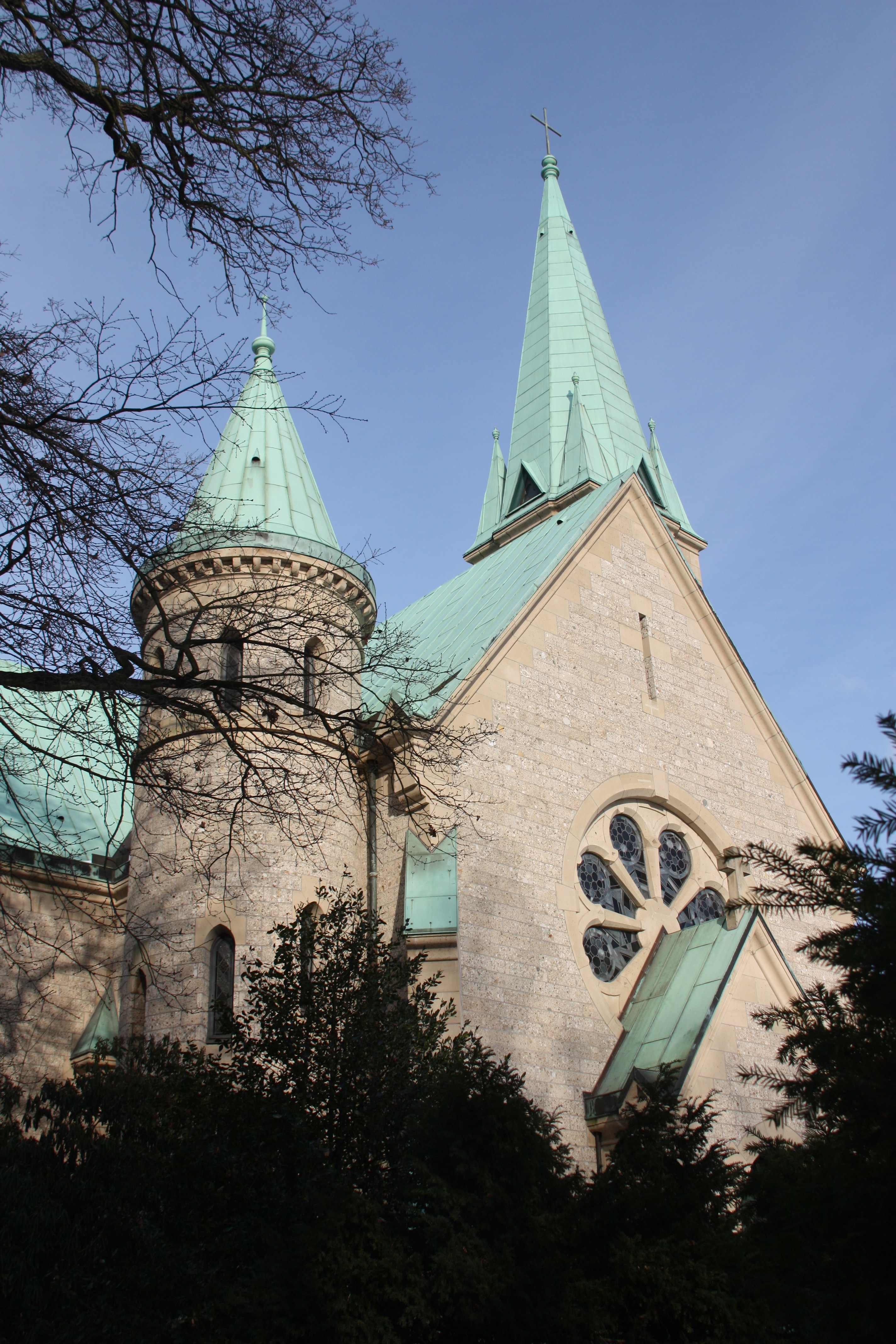 Hamburg, Christuskirche Othmarschen, Zwei Türme